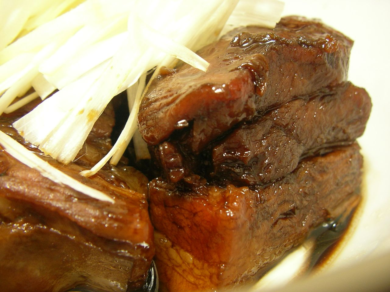 角煮